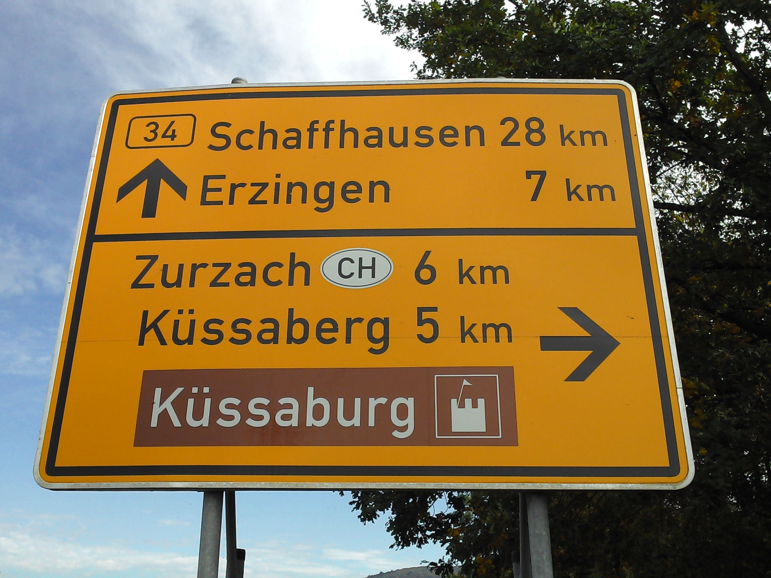 Küssaberg, Gemeinde im Landkreis Waldshut in Baden-Württemberg. Verkehrsschild an der Bundesstraße 34.